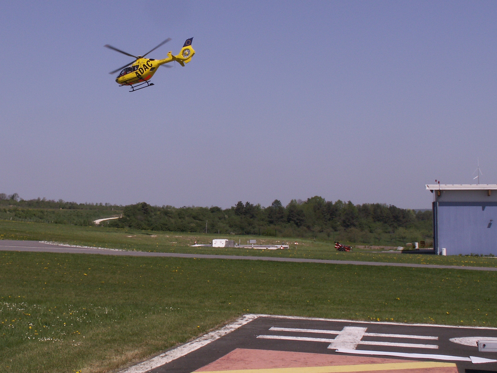 Schöngleina Christoph 70 D-HGYN ADAC-Luftrettung Rettungshubschrauber Eurocopter EC-135 Flugplatz Jena-Schönglein Foto 2006 Wolfgang Pehlemann Wiesbaden PICT0006